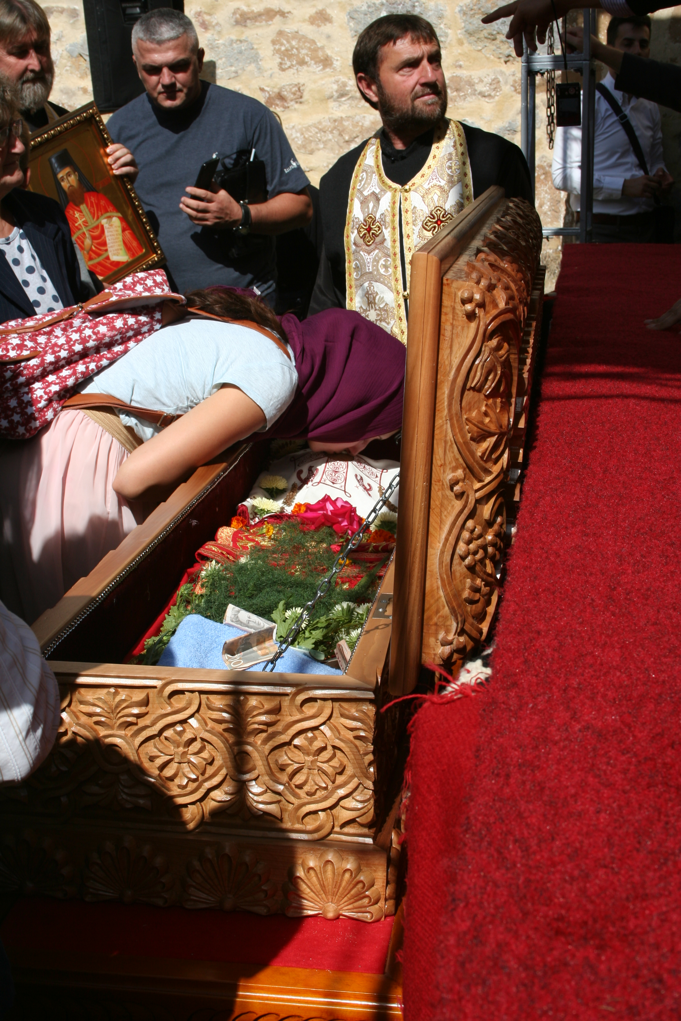 Manastir Tronoša-proslava 700 godina postojanja